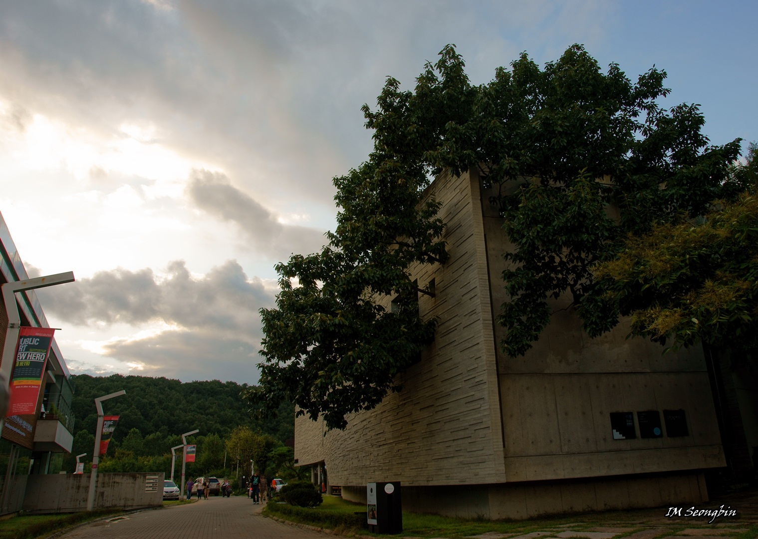 Keumsan Gallery, Heyri, Paju (금산 갤러리, 헤이리)